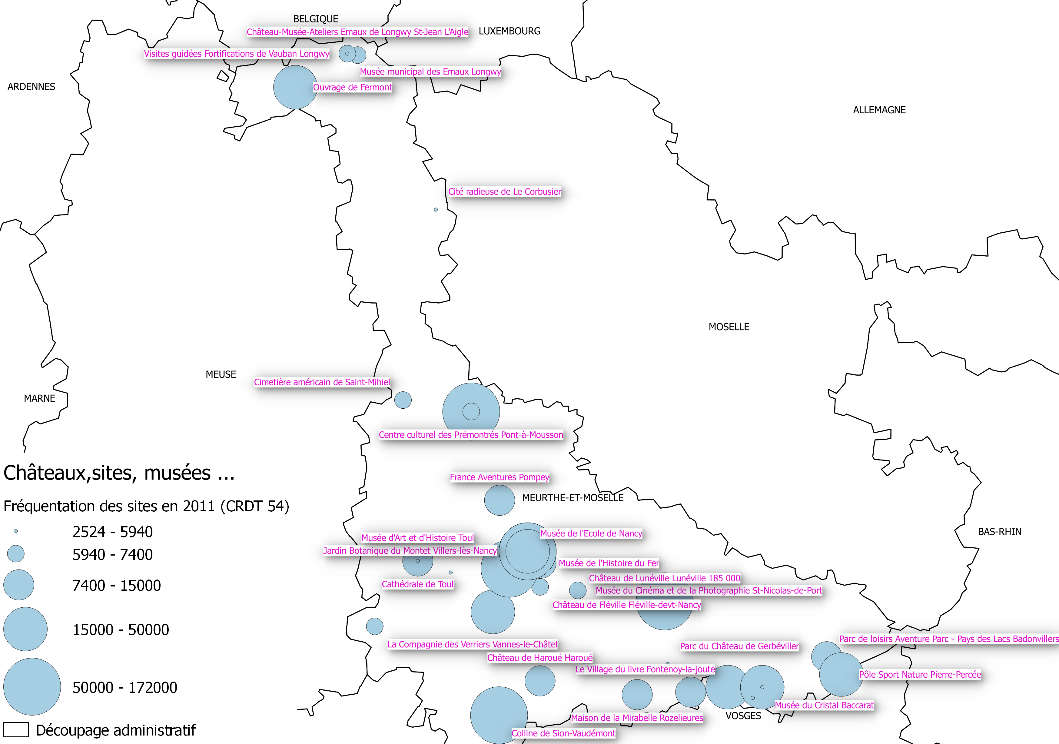 Source : offices de tourisme - réalisation Qgis